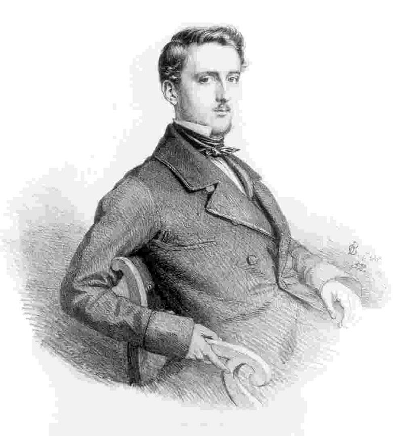 Selbstbildnis, Lithographie, 1852